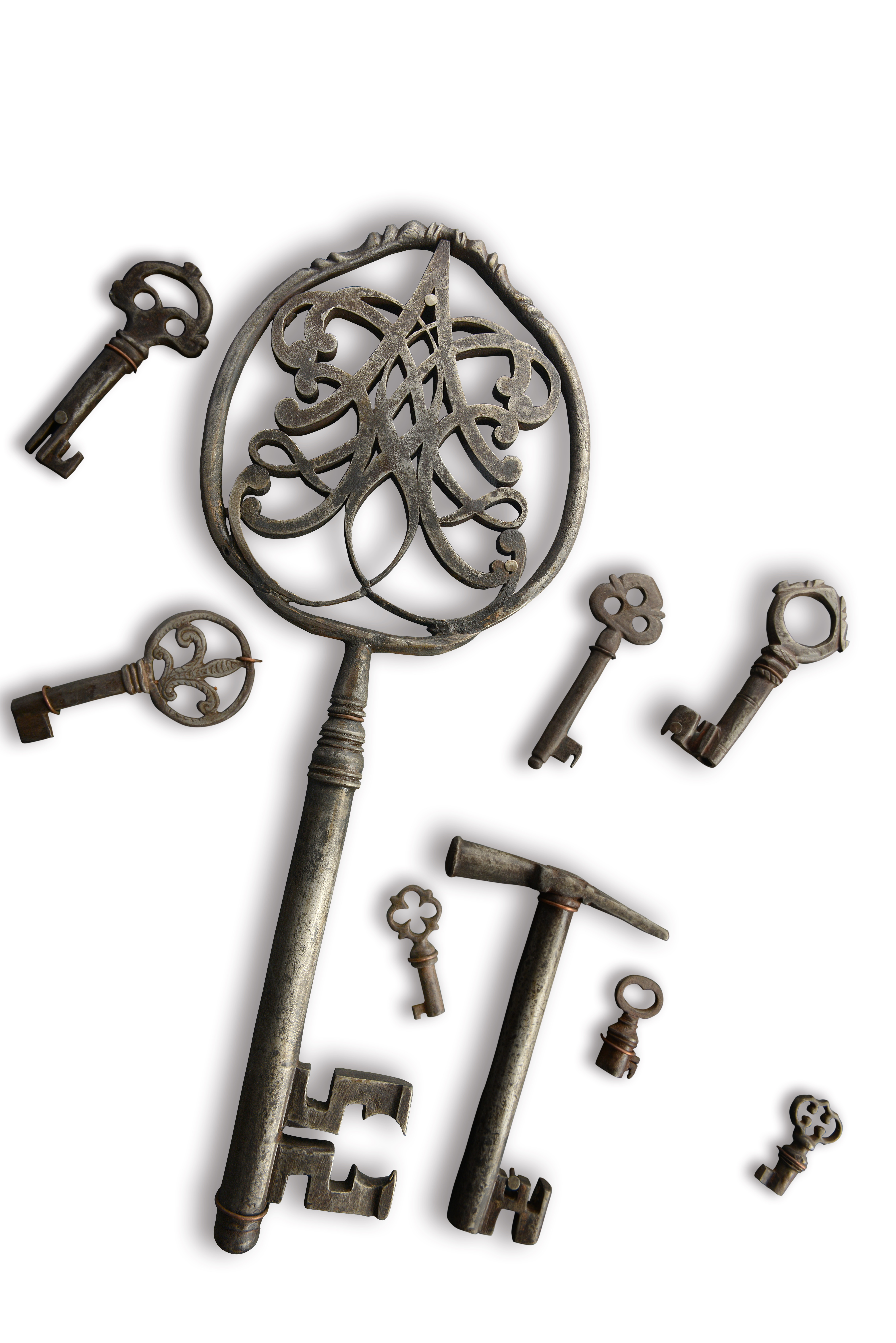 Llaves forjadas.